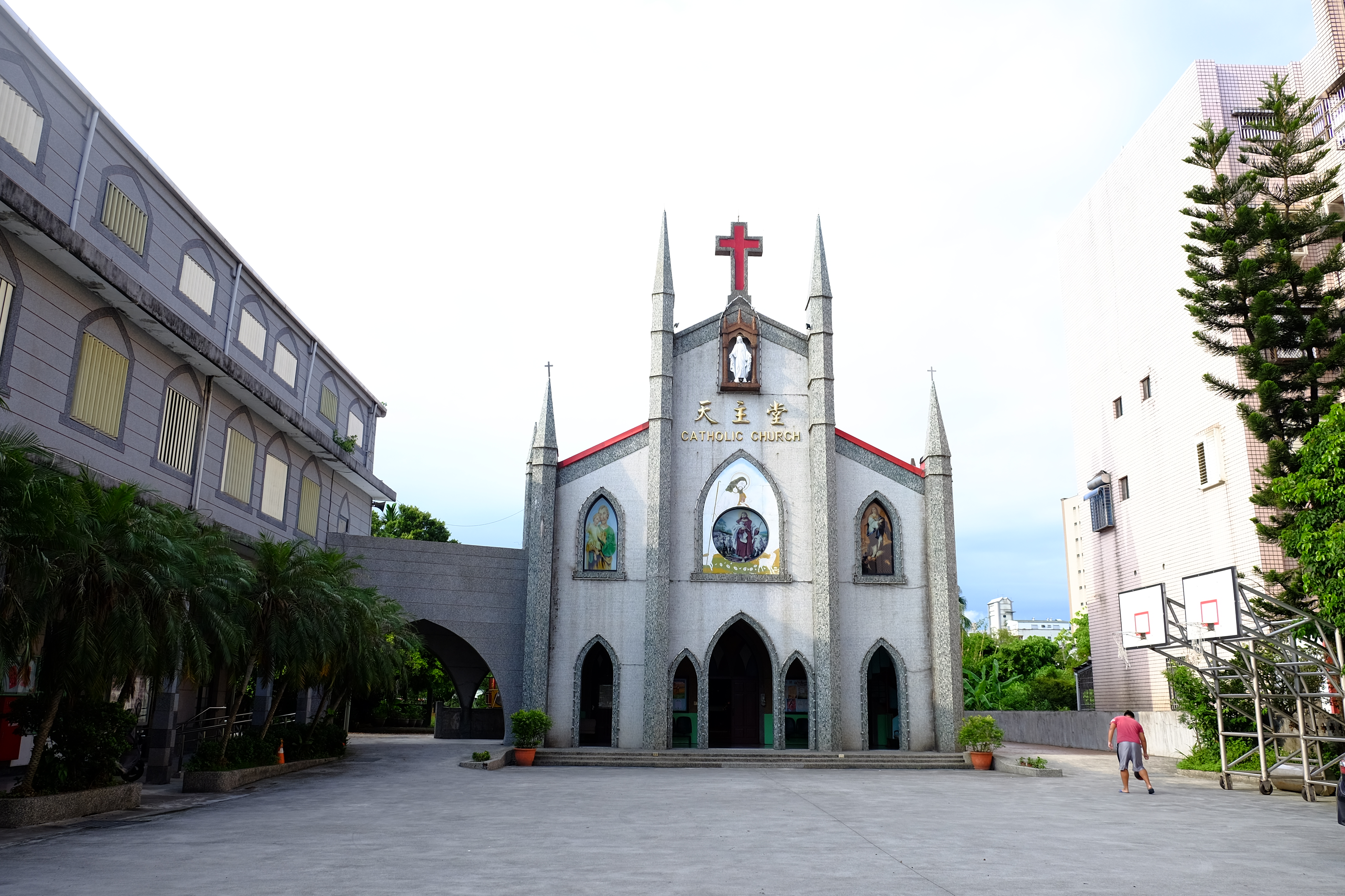 羅東聖母升天堂